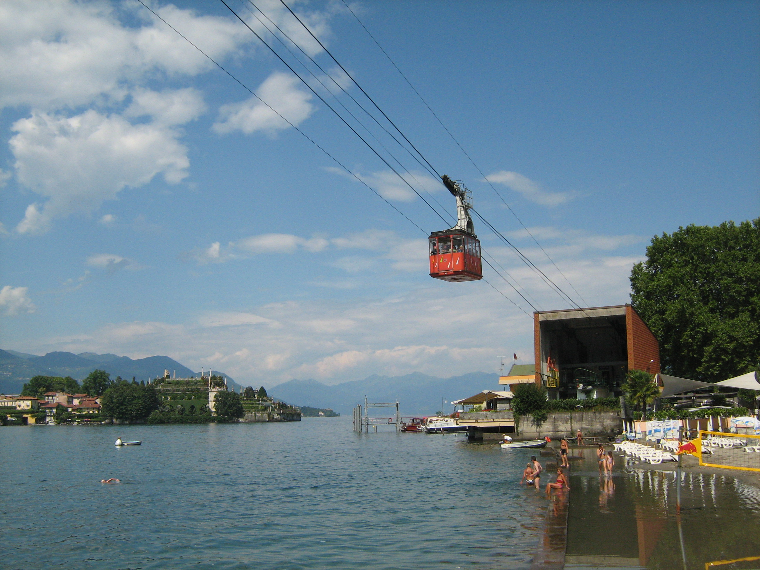 Svævebanekabinen tæt på dalstationen med Isola Bella i baggrunden t.v., juni 2009.